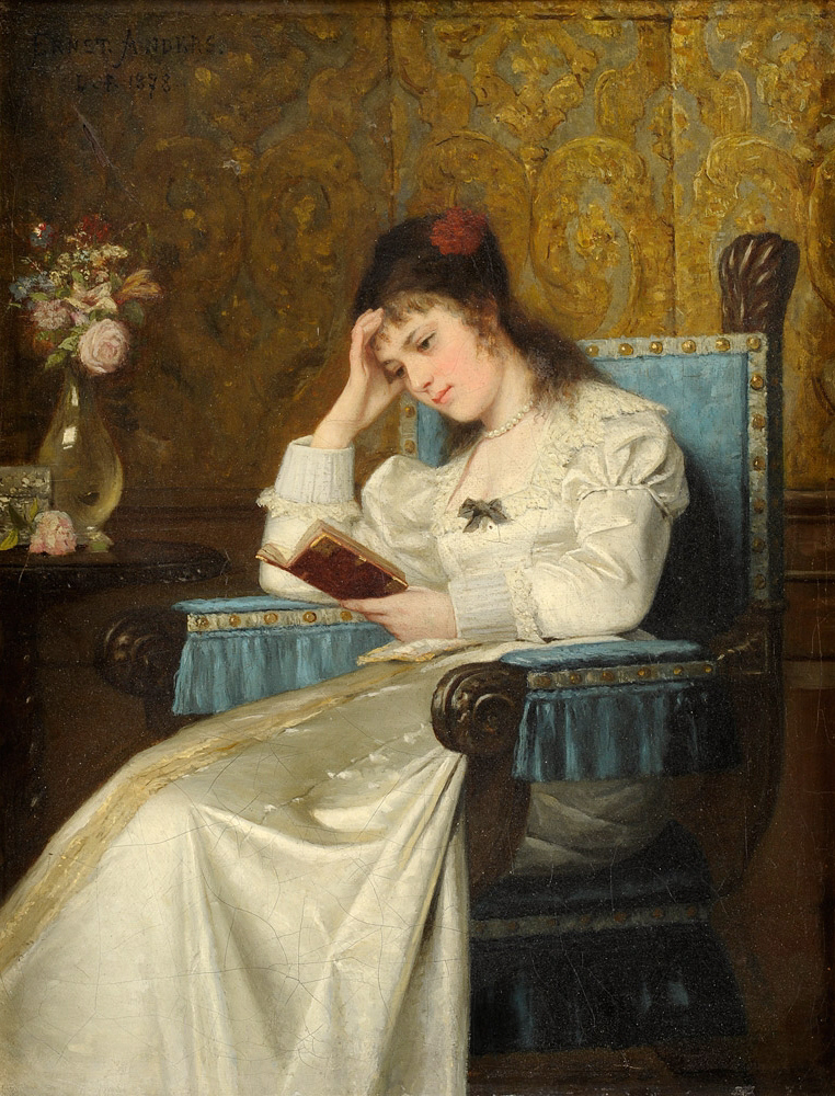 Ein stiller Moment. Signiert. Datiert 1878. Öl auf Leinwand, 40 x 30 cm